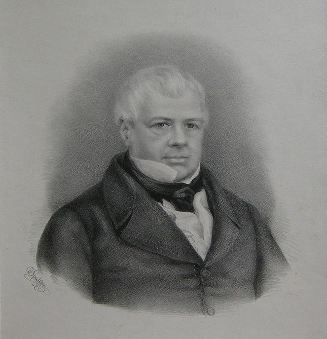 Portrait Karl Sieveking (1787-1847), Hamburger Syndikus, Diplomat und Kunstmäzen. Lithographie von Otto Speckter, 1847